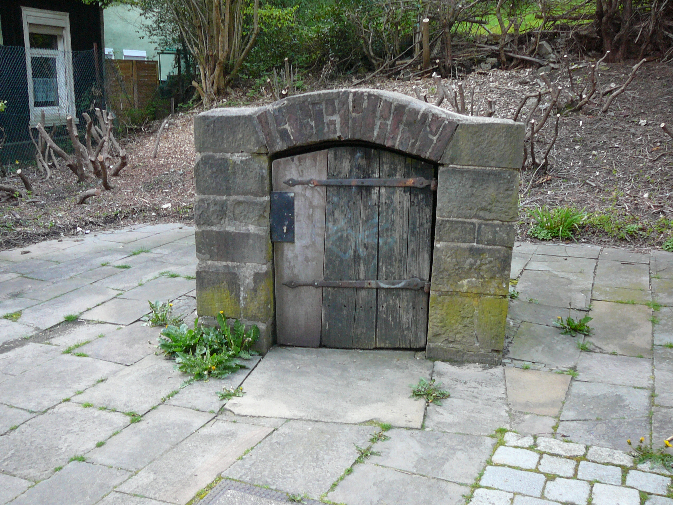 Borner Straße, Wuppertal